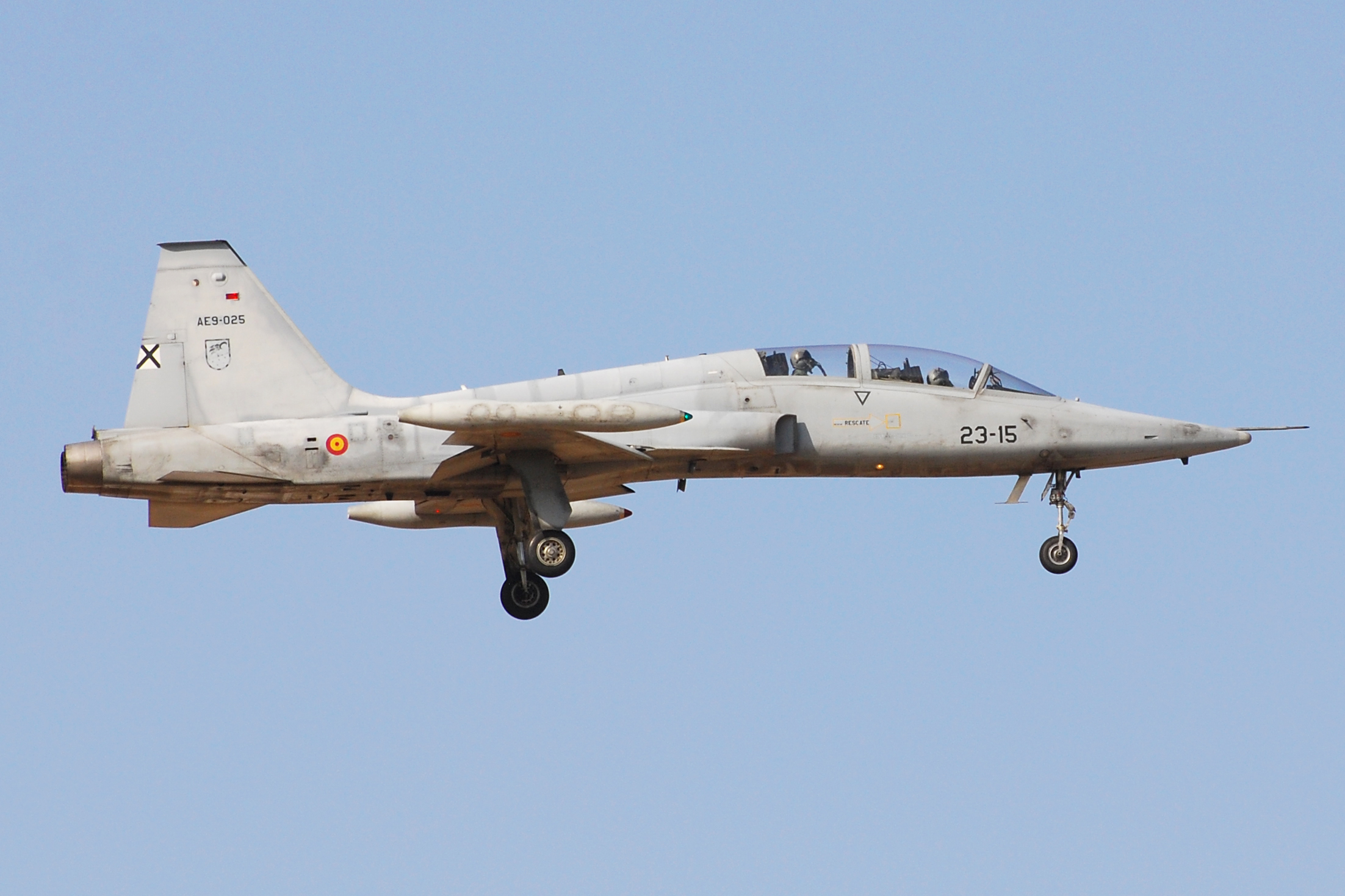 Avión Northrop SF-5B(M) (AE9-025 / 23-15) del Ala 23 - Ejercito del Aire de España